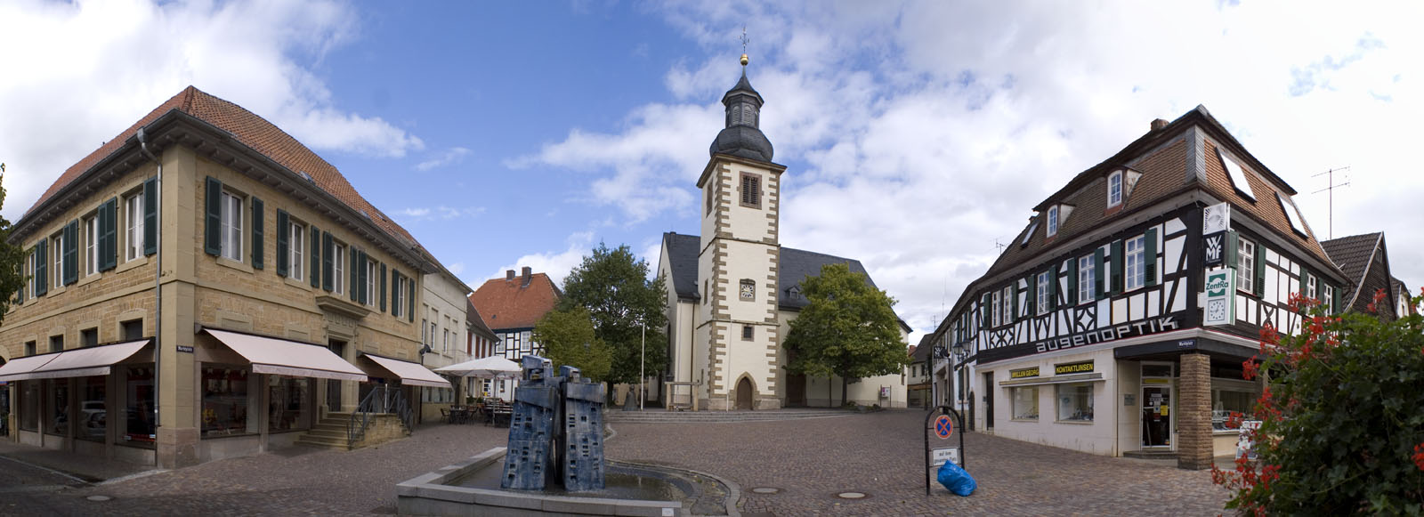 von links nach rechts: Marktplatz 9: stattlicher klassizistischer Sandsteinquaderbau mit abgewalmtem Mansarddach, Mitte des 19. Jahrhunderts; Ladeneinbau 20. Jahrhundert -- Marktplatz 7: barockes Eckwohnhaus, heute Kahnweilerhaus; teilweise Fachwerk, Krüppelwalmdach, 18. Jahrhundert; straßenbildprägend -- Marktplatz 2: Protestantische Pfarrkirche; mittelalterlicher Turm mit barocker Haube, spätbarocker Saalbau, 1780–84, Architekt Franz Wilhelm Rabaliatti; Ausstattung, Orgel, 1788 von Philipp Christian Schmidt, Rockenhausen --Marktplatz 1: barocker Mansarddachbau mit Zierfachwerk, bezeichnet 1737; Ladeneinbau 20. Jahrhundert